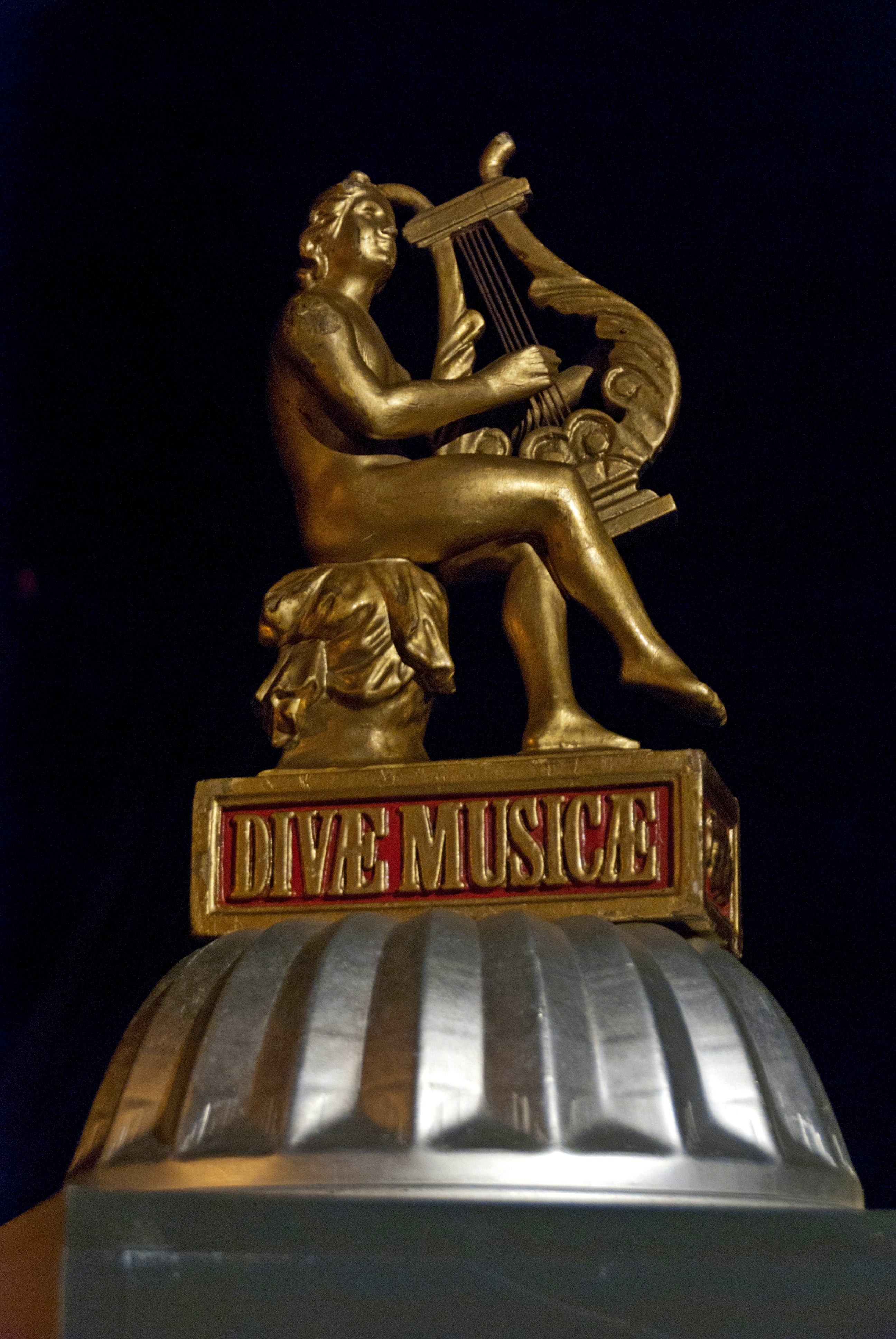 Kroonwerk van vaandel van Harmonie Ons Genoegen gemaakt door Jean François Brouwenaar.